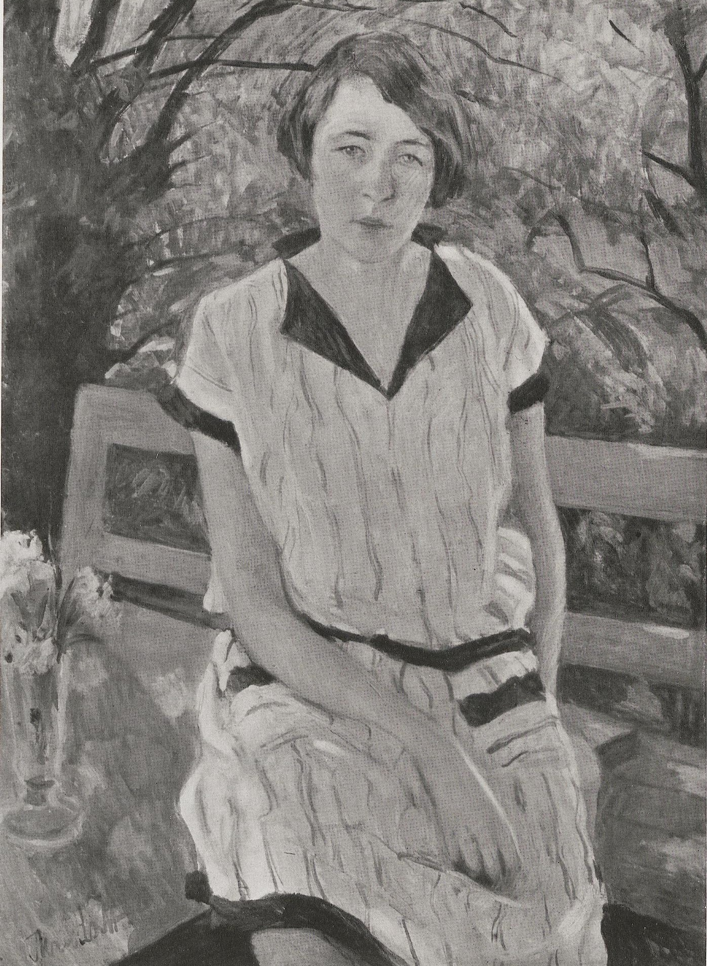 Konrad von Kardorff - Bildnis der Tochter des Künstlers (das ist Ursula von Kardorff)